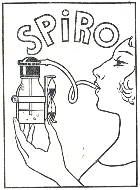 Spiroscope du docteur Jos Jullien (extrait de la notice d'utilisation)